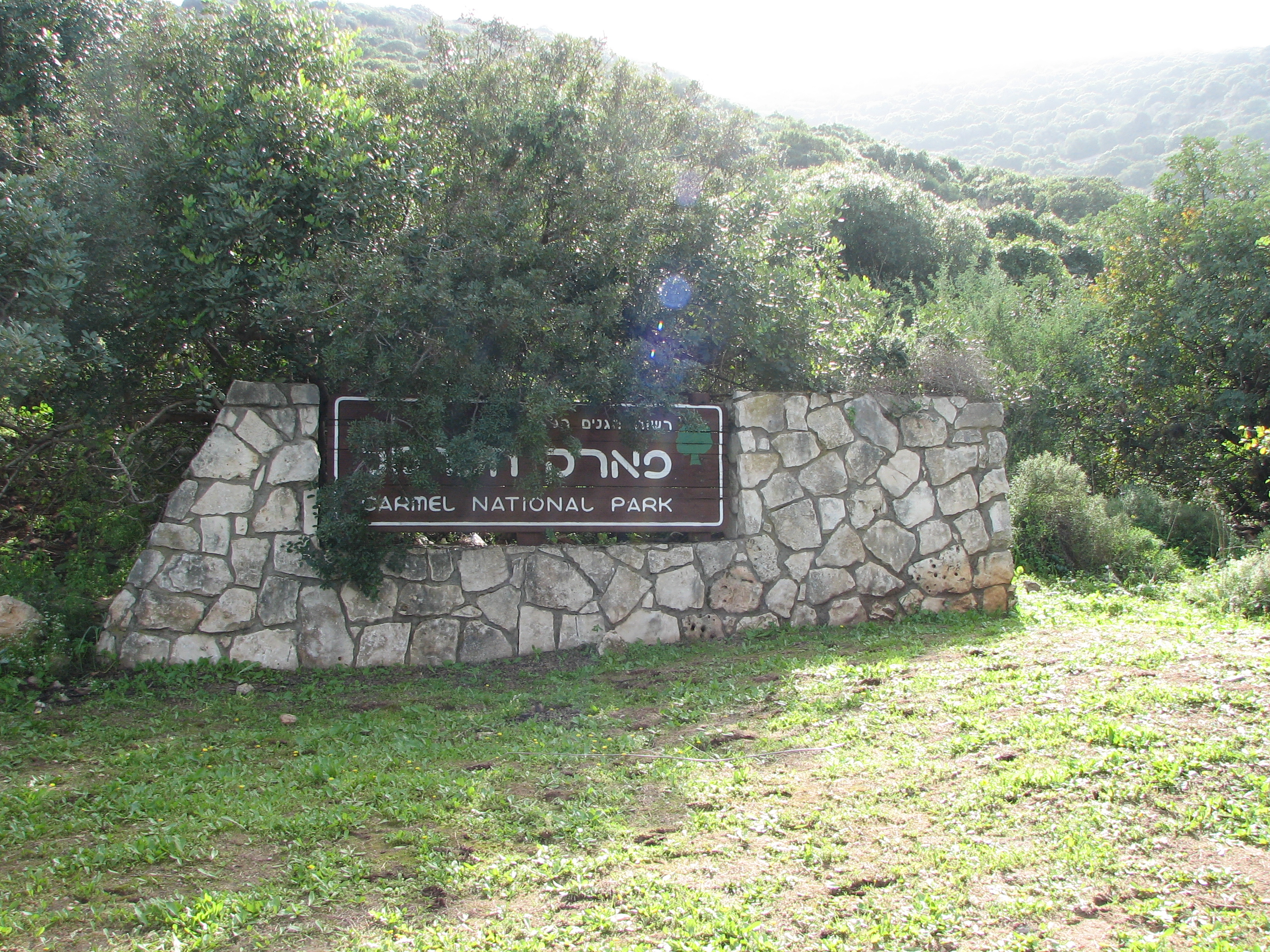 Nesher Green Paths, between Nesher - Yagur on Mount Carmel Israel. View from the path השביל הירוק בין העיר נשר וקיבוץ יגור, על הצלע הצפונית של הר הכרמל. מראות על השביל שלט המודיע על התחלת פארק הכרמל בשכונת גבעת נשר